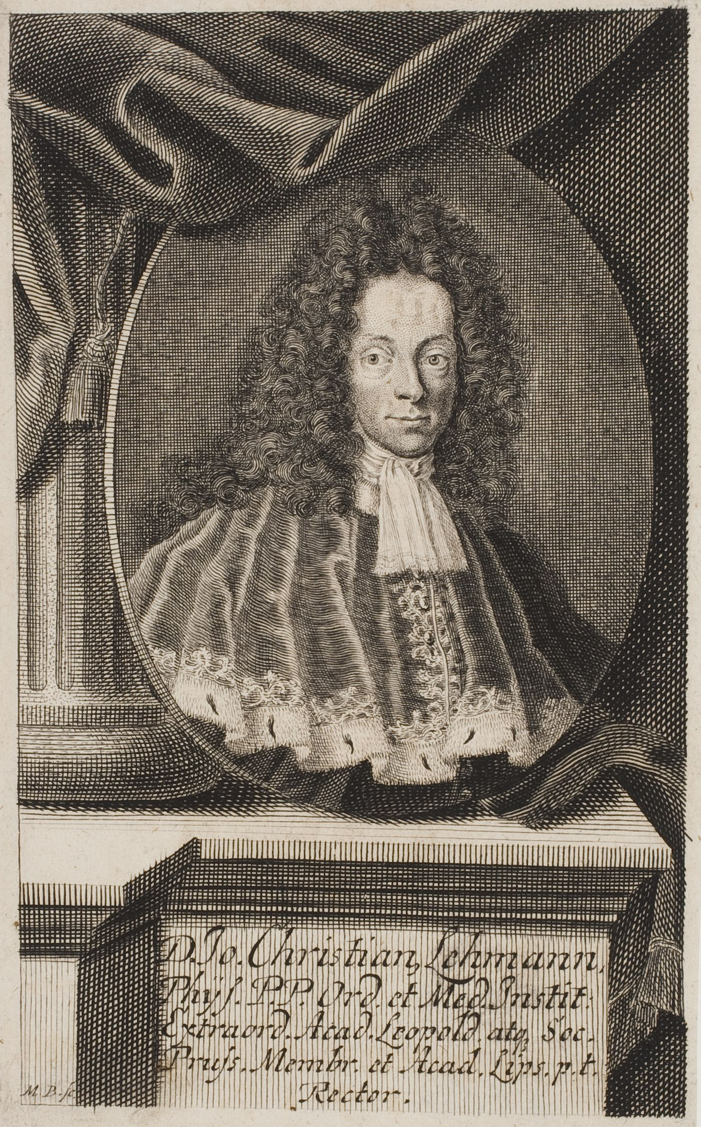 Bildnis Johann Christian Lehmann (1675–1739), Mediziner und Physiker, Rektor der Universität Leipzig; Frontispiz zu: Deutsche Acta Eruditorum ... 46.Theil, 1717, Leipzig, bei: Johann Friedrich Gleditschs Sohn [= Johann Gottlieb Gleditsch]